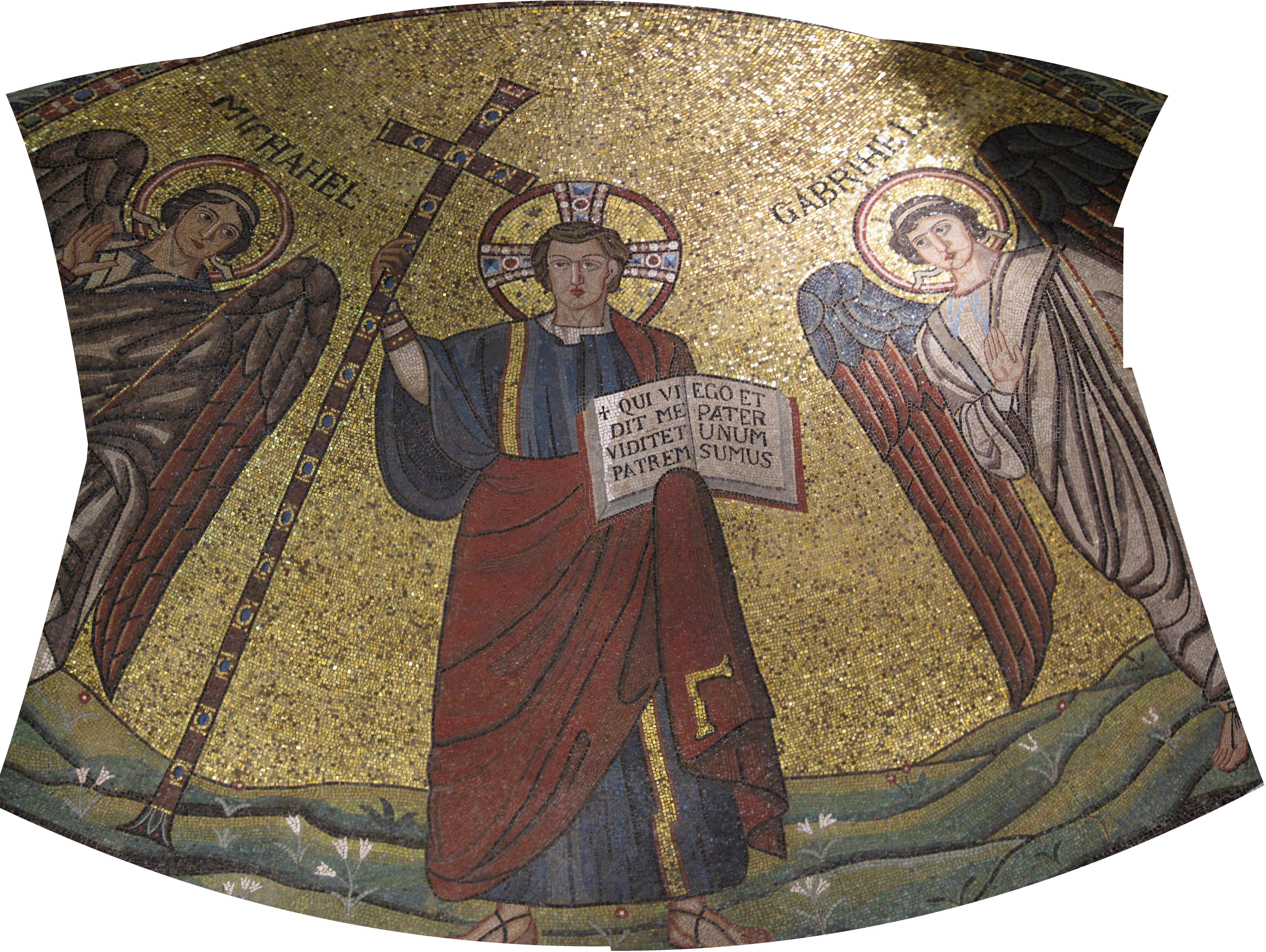 Apsismosaik. Ravenna, 545 CE. — Tesserae aus farbigen Smalten und Stein. Apsis: Christus Victor mit Erzengeln Michael und Gabriel. Stirnwand: Thronender Christus, Erzengel und posaunende Engel. Erworben 1903 Museum für Byzantinische Kunst, Inv. 6642.